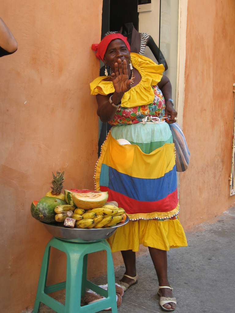 Palenquera vendiendo frutas. Cartagena, Colombia